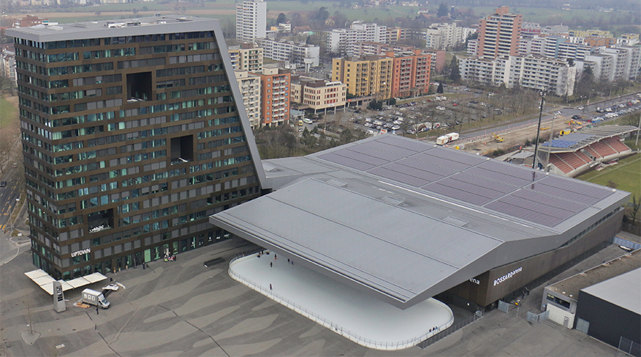 Luftbild / Luftaufnahme Bossard Arena Zug von Skymotion.ch